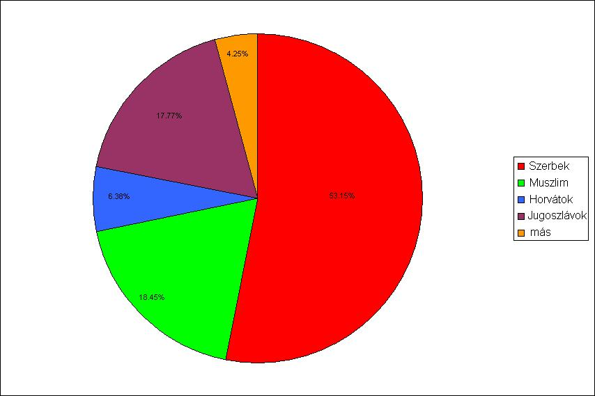 Етнички састав Старчевице (мађарски језик)